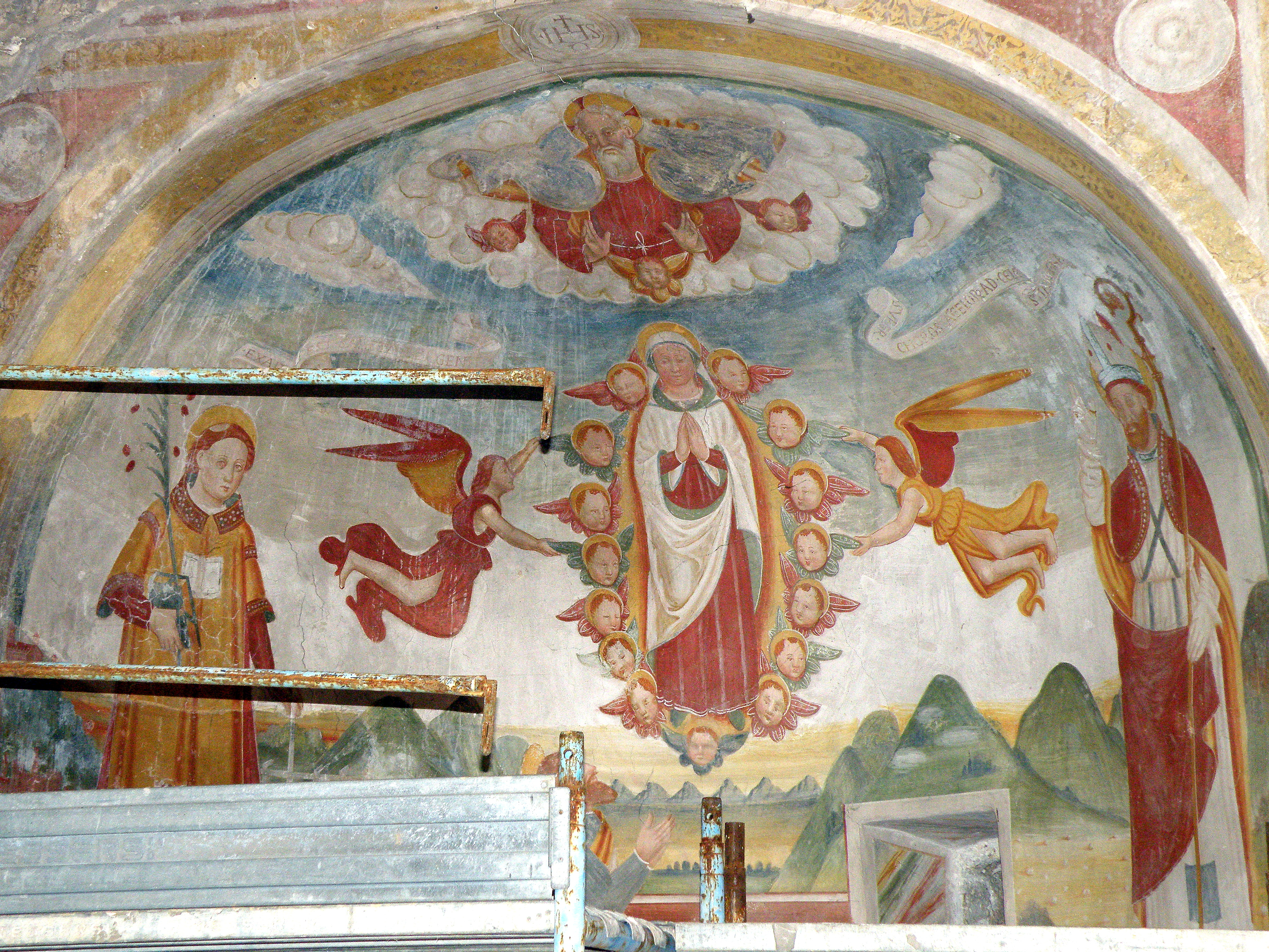 Gemonio, comm. italienne de la prov. de Varese. Église romane Saint-Pierre (chiesa di San Pietro), fresque dans l'abside latérale gauche, représentant l'Assomption, avec saint Laurent, patron de l'église de Cuvio, et saint Abundius, patron du diocèse de Côme.